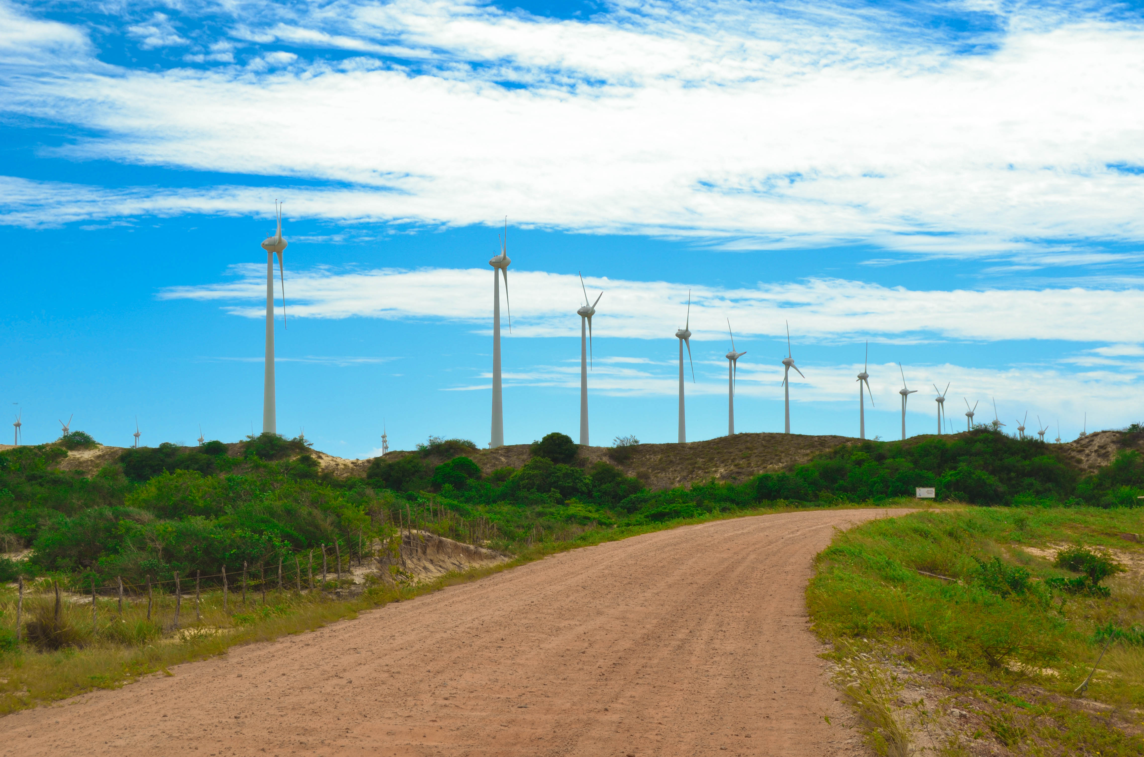 O Parque eólico de Rio do Fogo é o terceiro maior parque eólico do Brasil localizado na cidade de Rio do Fogo (distante 81 km de Natal) no estado brasileiro do Rio Grande do Norte.